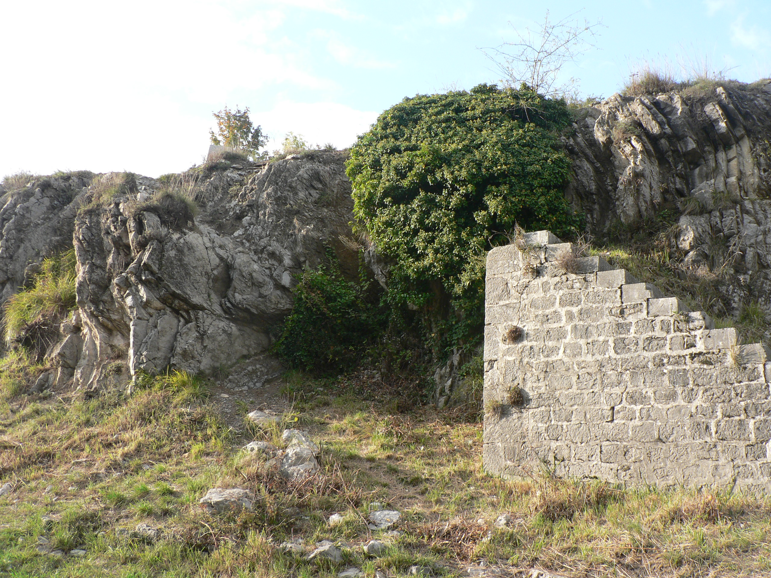 Grenoble, fort de la Bastille: escalier en pas de souris